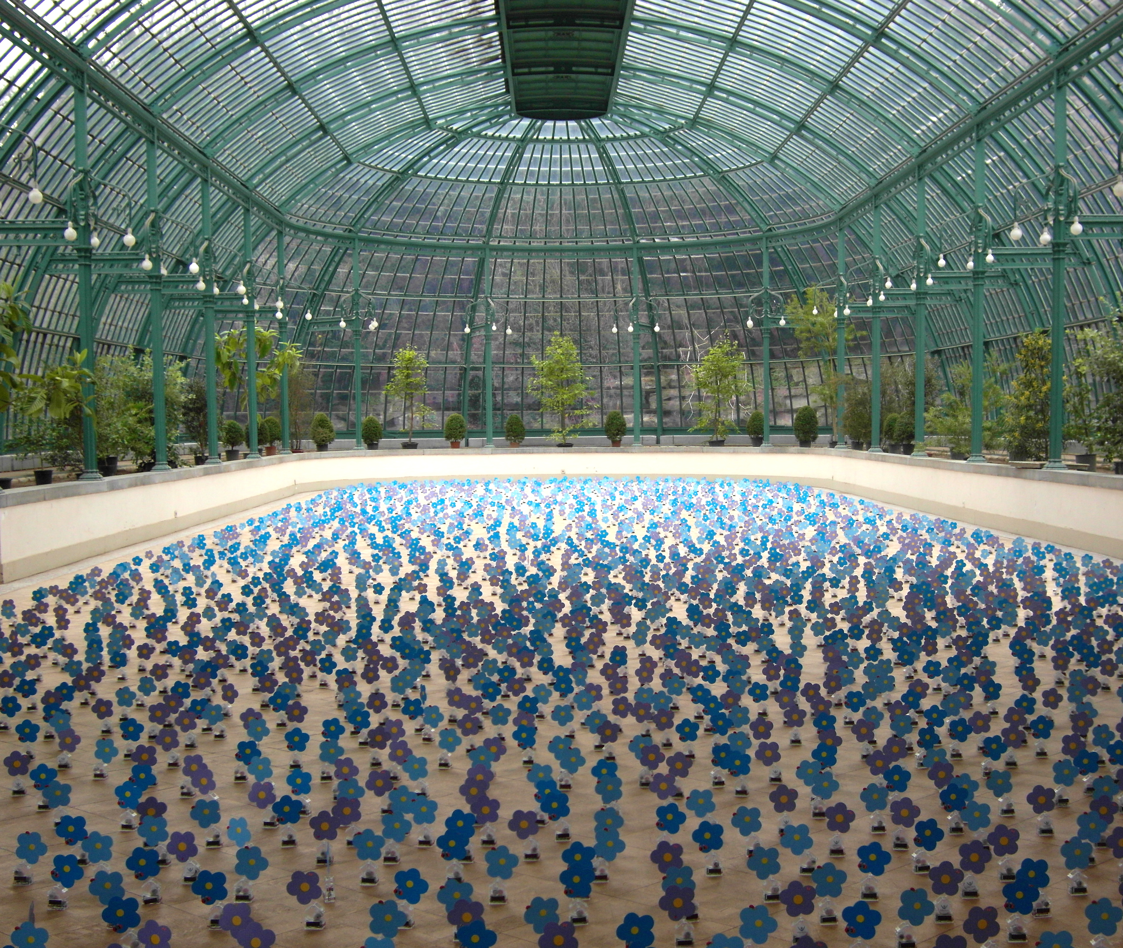 « The Dancing Solar Forget-Me-Not » - Alexandre Dang - Serre Royale de Laeken, 2010